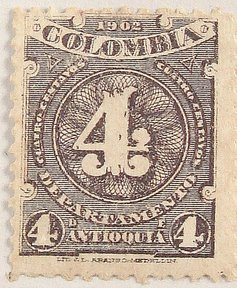 Antioquia stamp